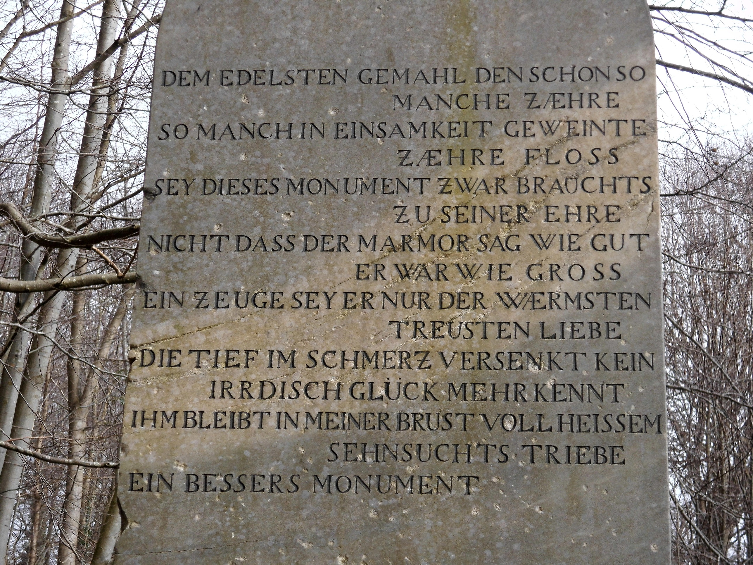 Rückseite des Denkmals zu Ehren von Christian Emil Reichsgraf zu Rantzau (1716 - 1777) auf Gut Rastorf. Siehe auch Vorderansicht